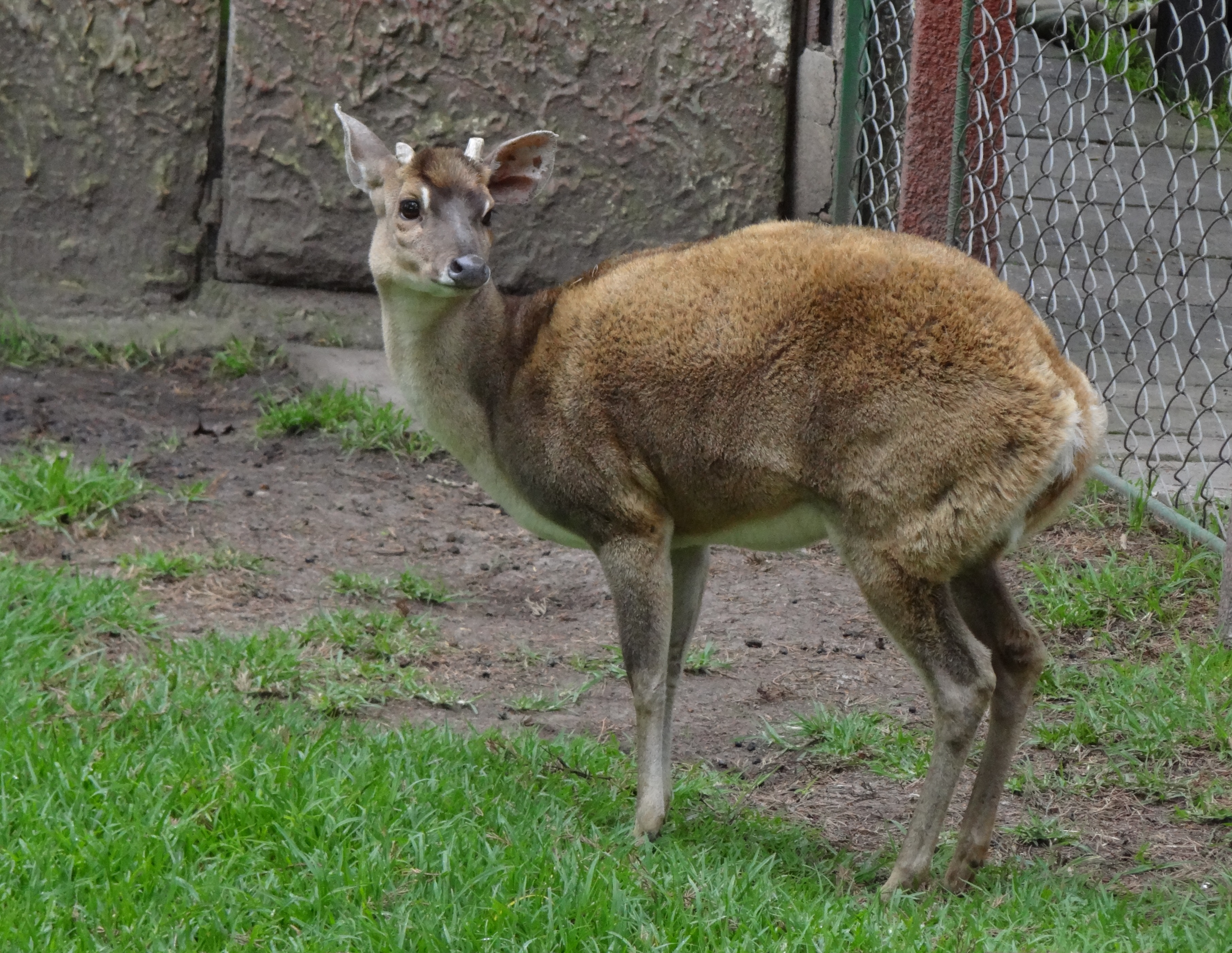 Ejemplar de guazuncho (Mazama gouazoubira), zoológico Parque Jaime Duque